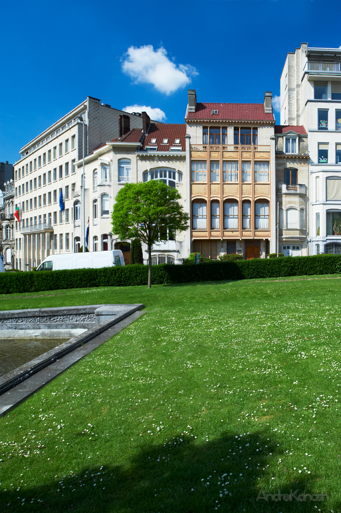 Hotel van Eetvelde, Victor Horta Unknown hotel van eetvelde, victor horta